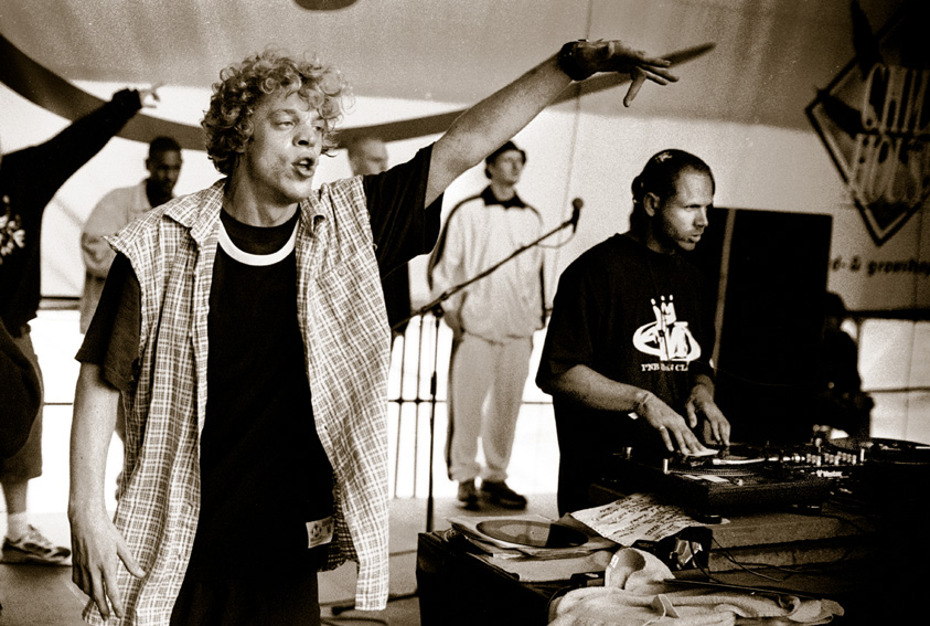 Dj Stylewarz und ferris Mc live auf dem splash! 2001